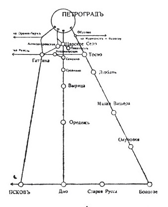 Petrogradoko trenbideak 1917an